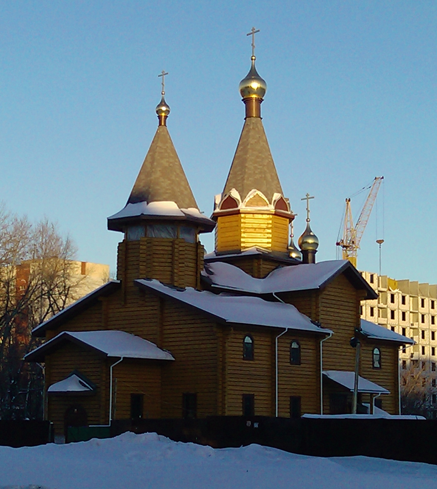 Церковь в честь иконы Пресвятой Богородицы «Умиление»